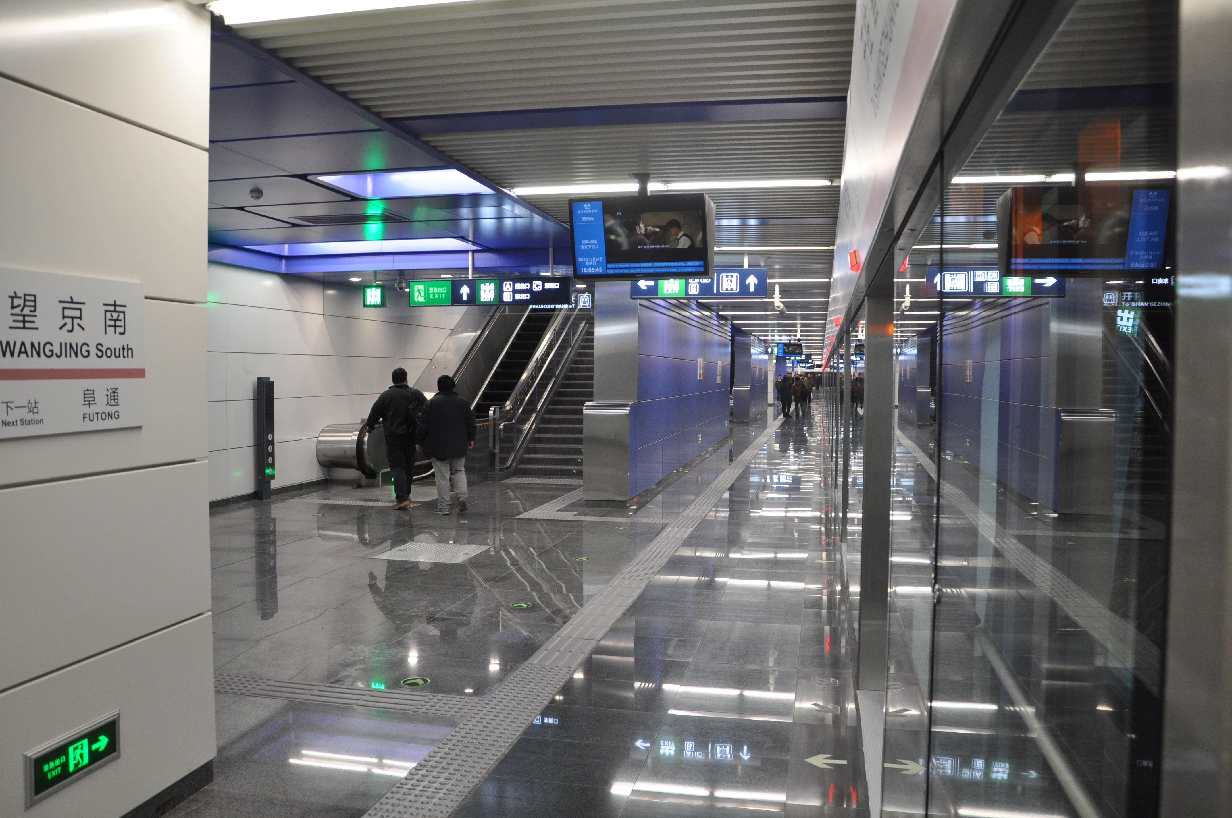 北京地铁14号线望京南站站台